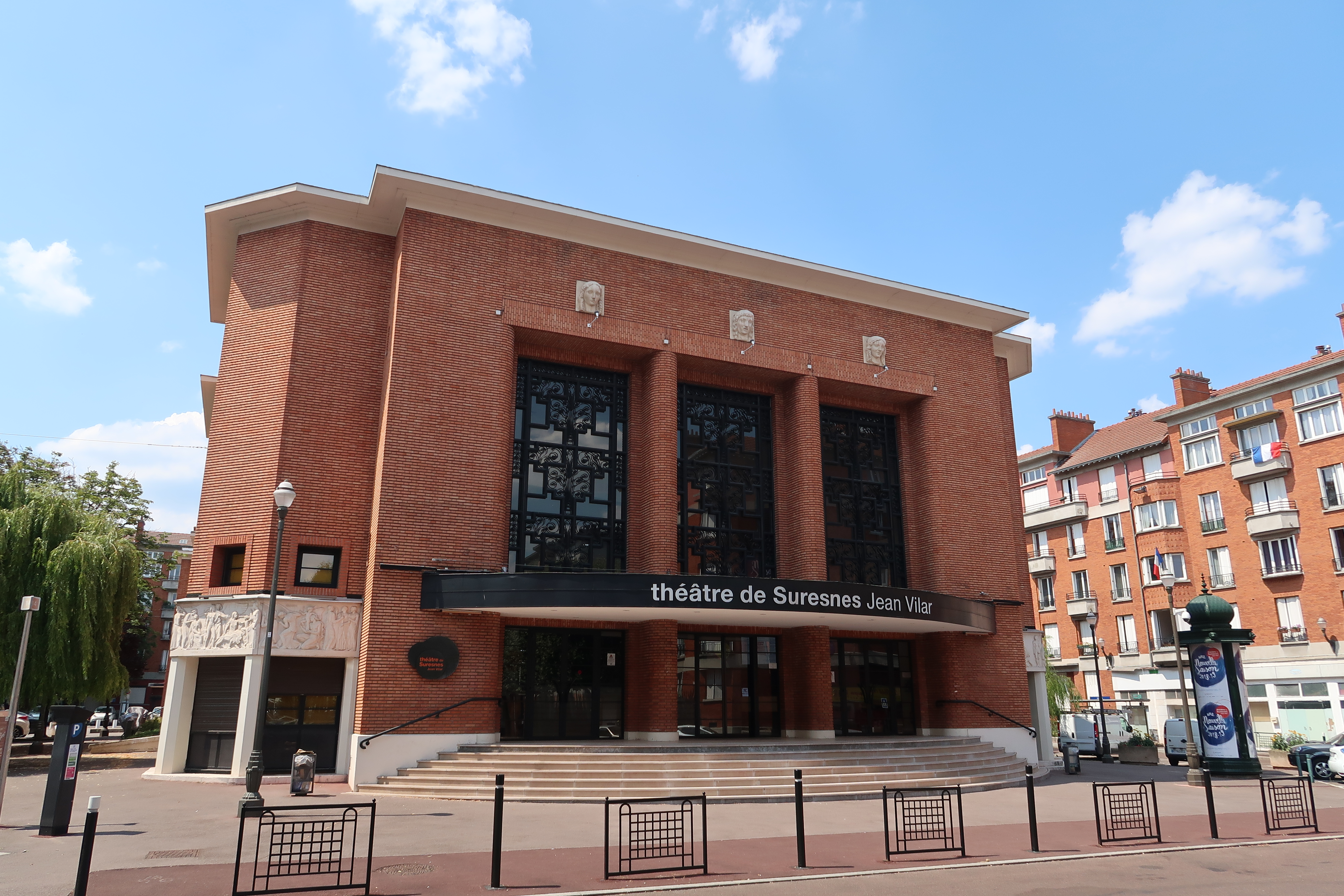 Théâtre Jean-Vilar à Suresnes (Hauts-de-Seine).